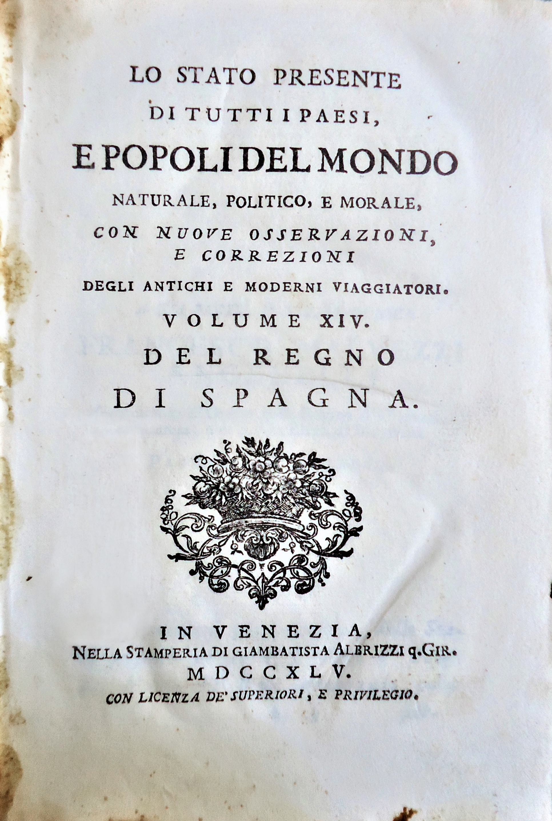 Edizione: Giambattista Albrizzi q. Gir, Venezia.